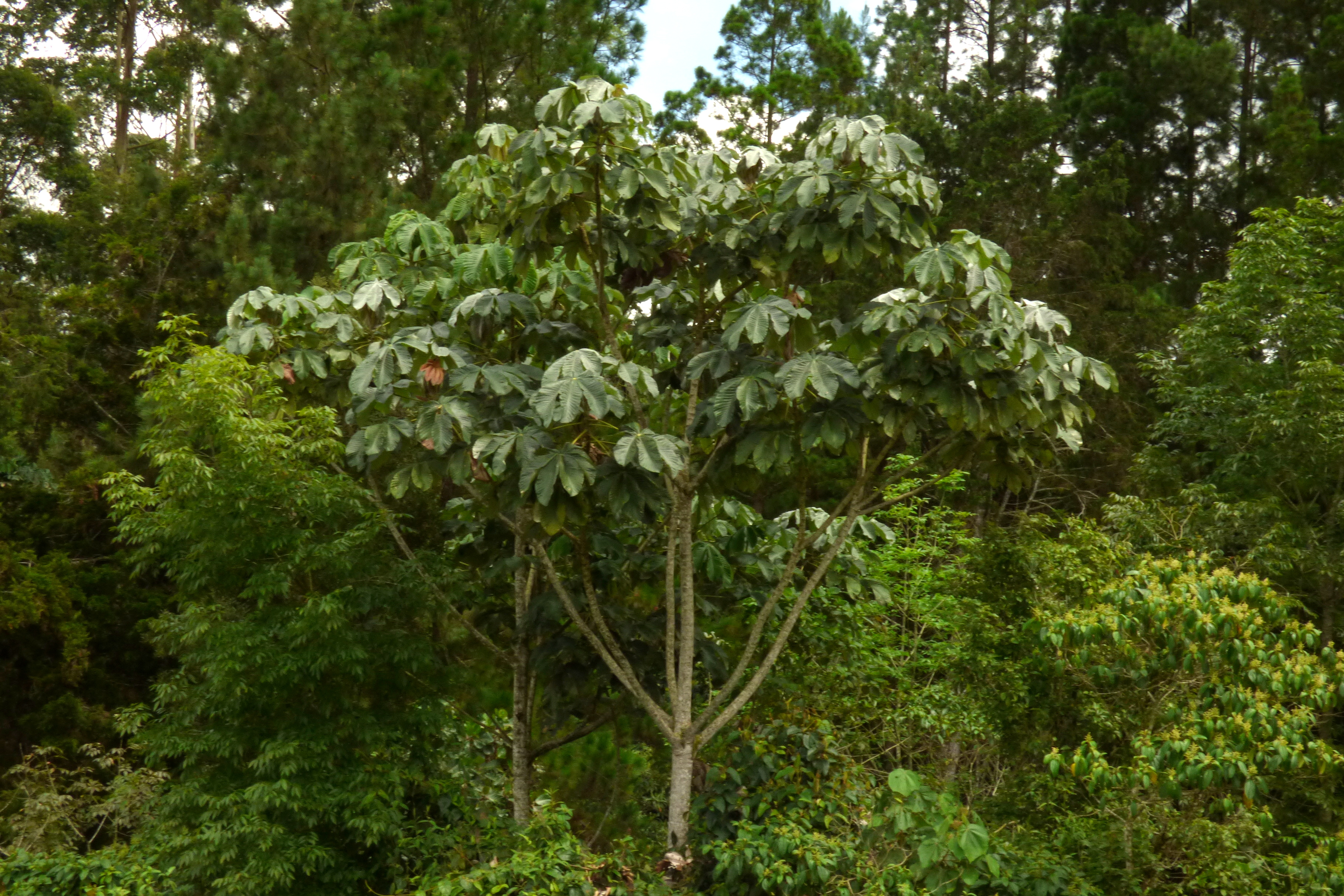 Yarumo negro (Cecropia angustifolia)